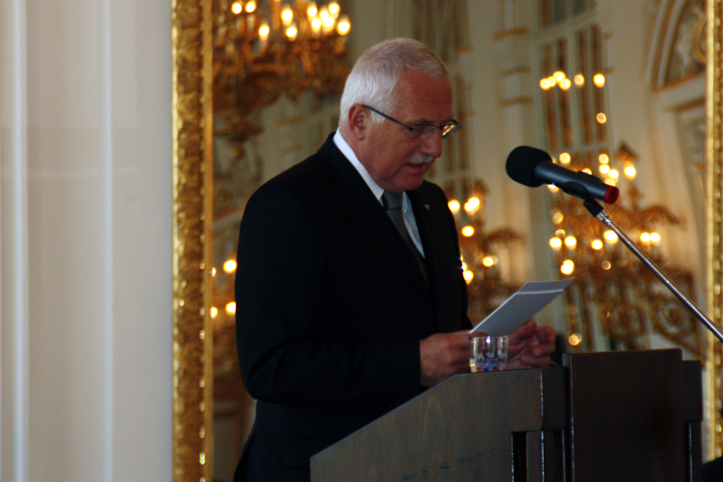 Präsident Václav Klaus bei der Überreichung des Adalbert-Preises 2009 an A. Göncz